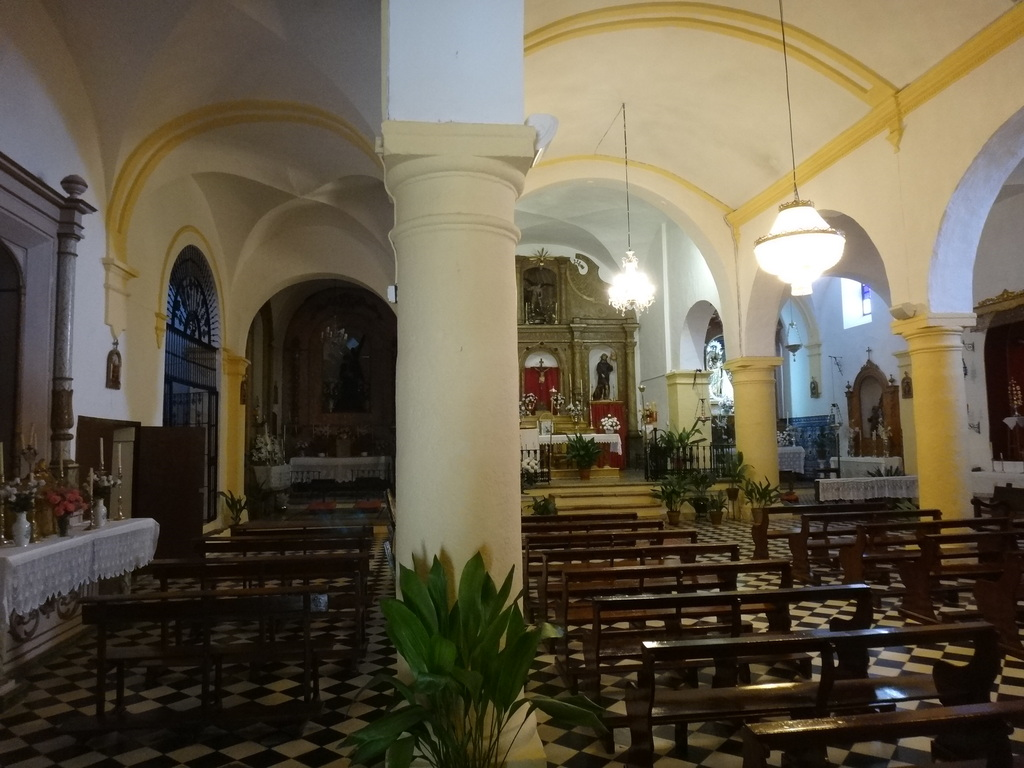 Iglesia de San Miguel en Villalluenga del Rosario (Andalucía, España)